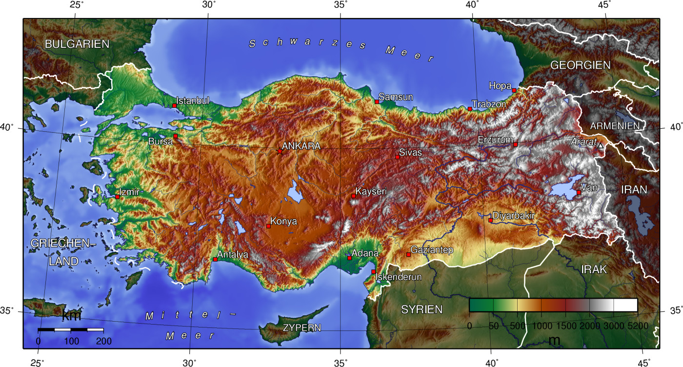 Topografische Karte der Türkei